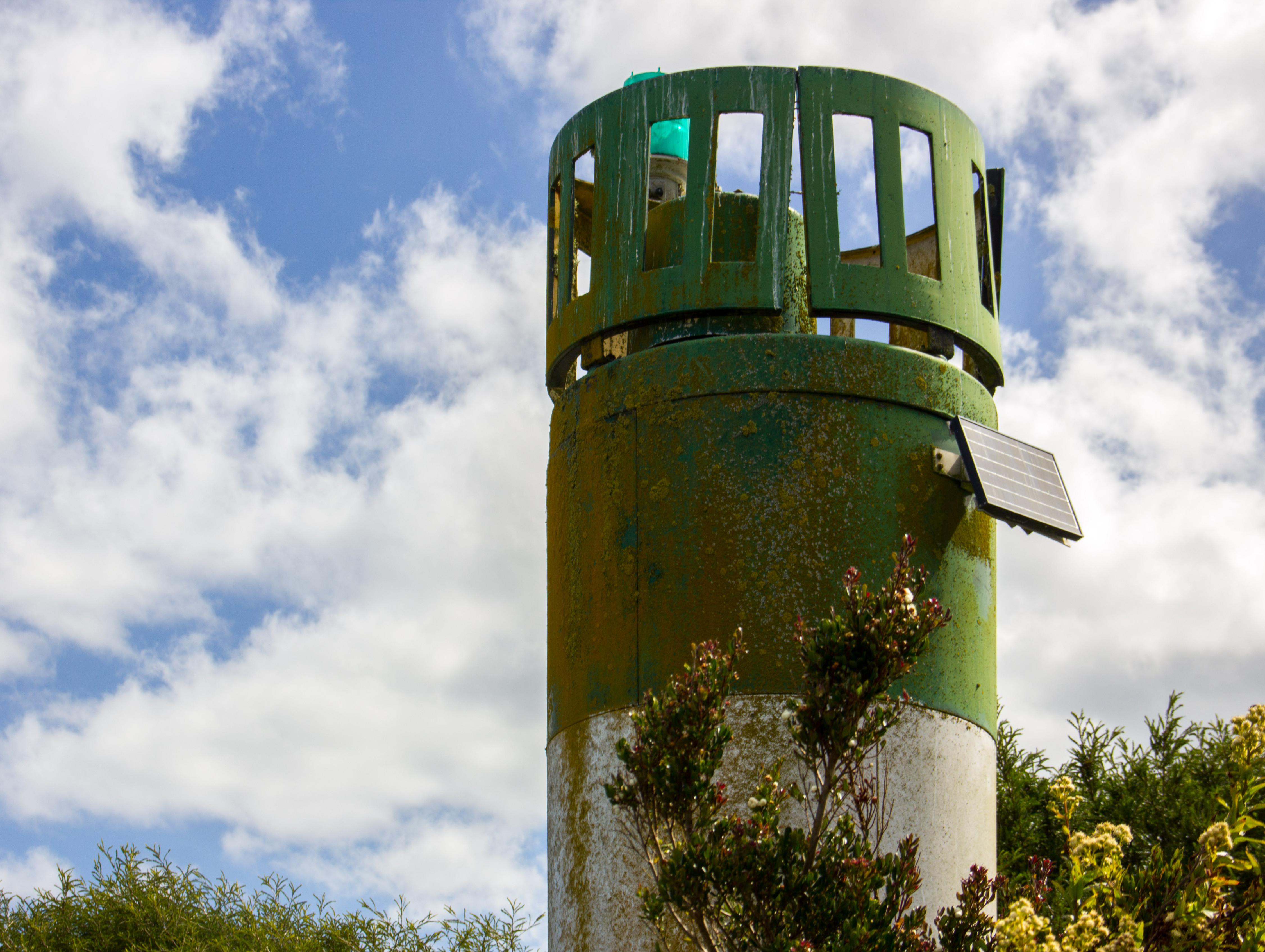 Chiloe - X Region